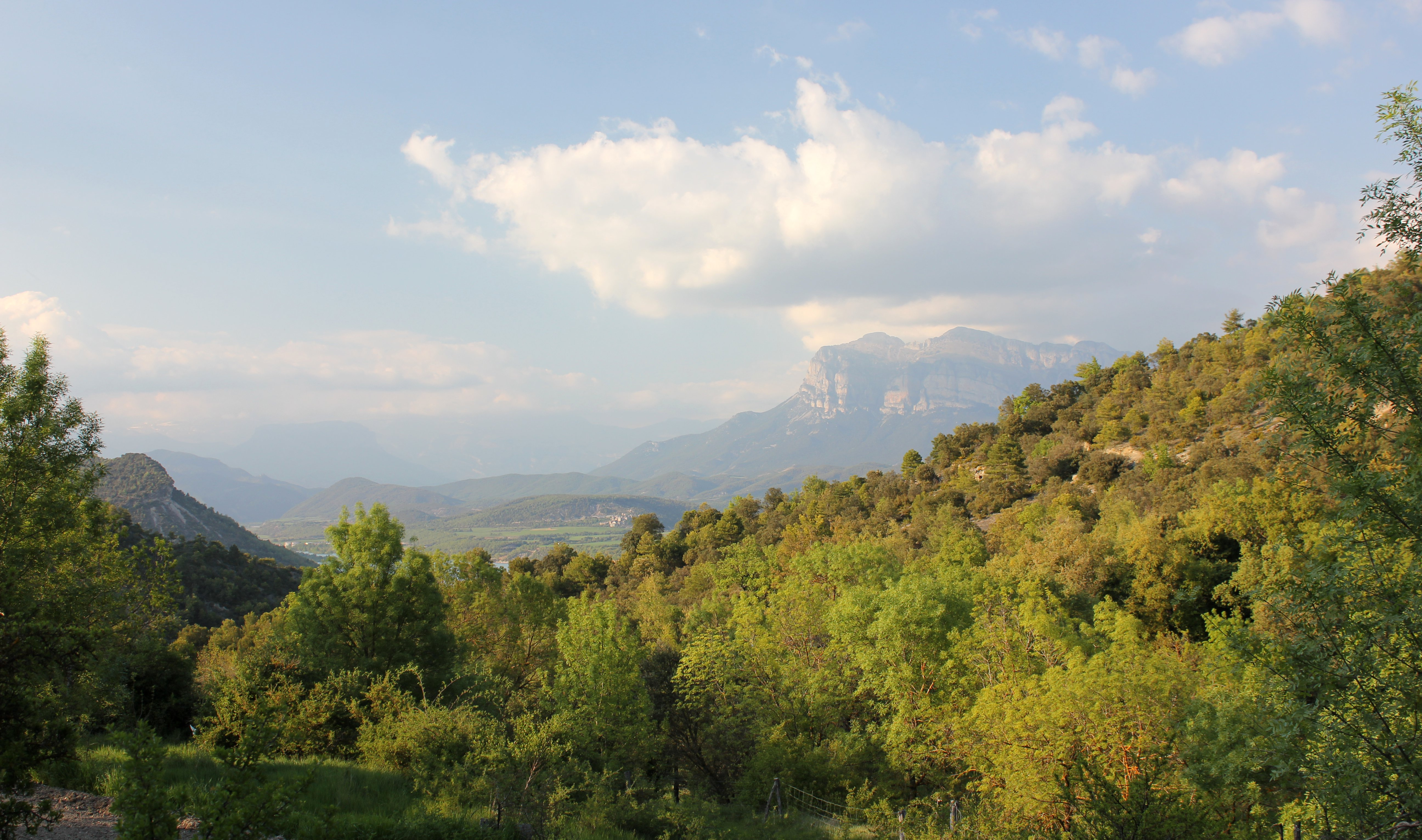 Aragonés: Cosculluela de Sobrarbe